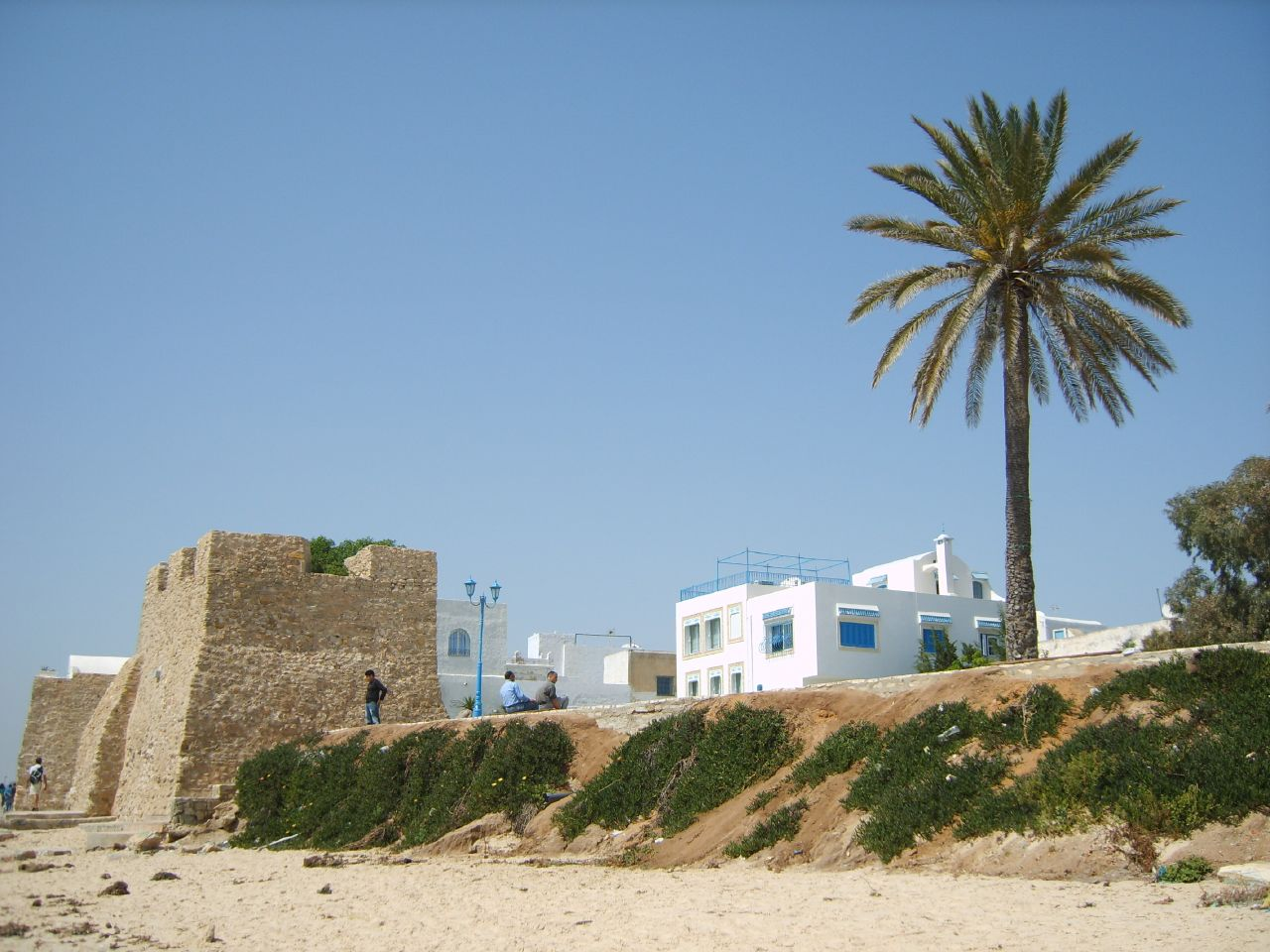 Kasbah of Hammamet, Tunisia.